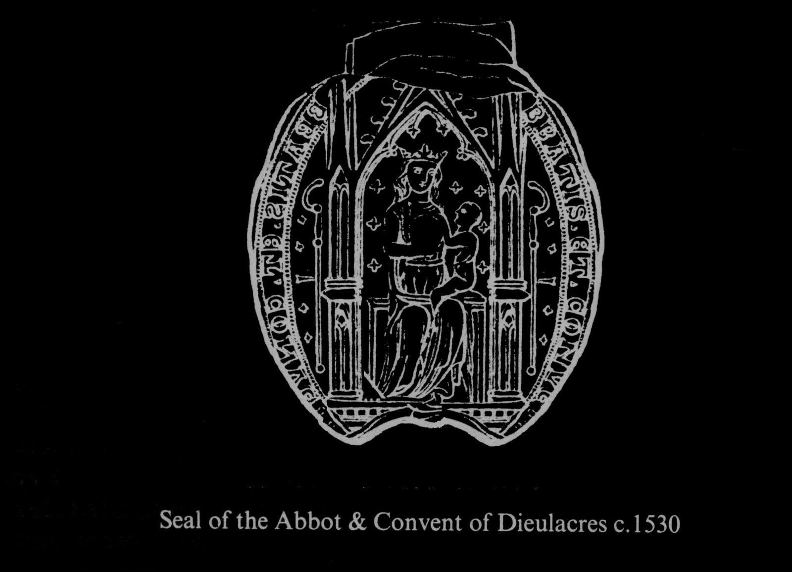 Sceau de l'abbé de Dieulacres, dans le Staffordshire, vers 1530